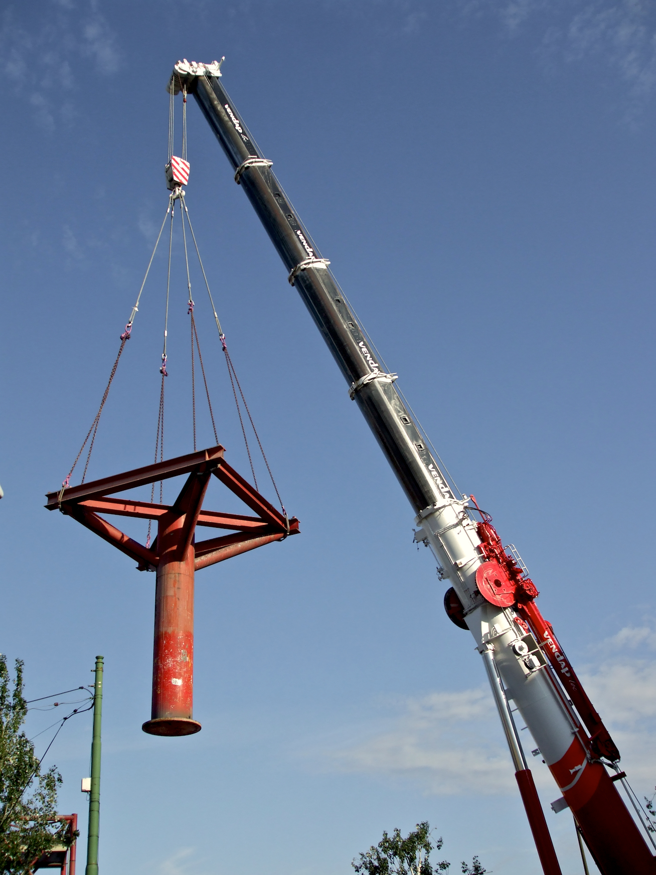 Demolição de uma passagem superior na Linha de Cintura em Alcântara, Lisboa, 2008.09.20.